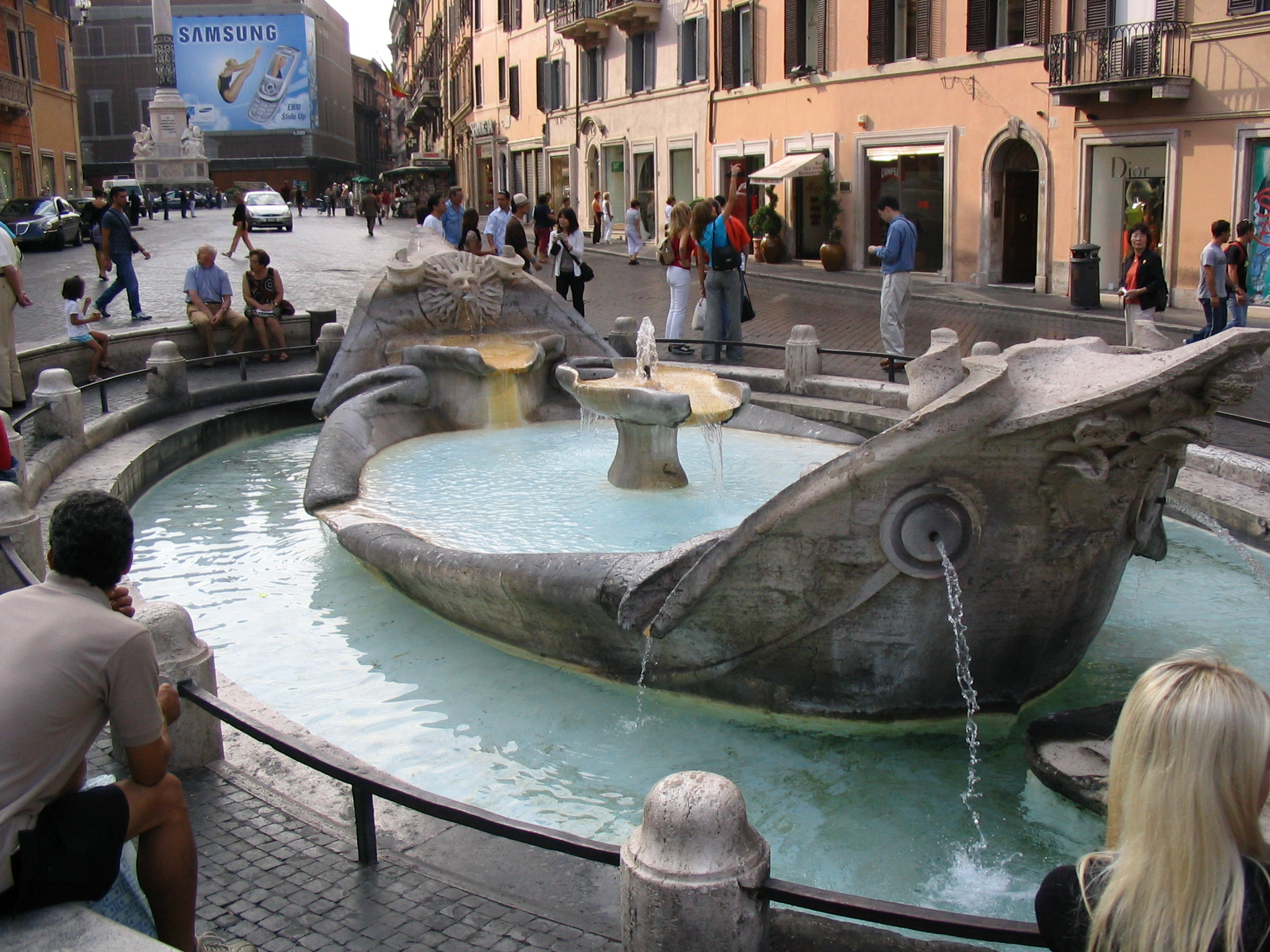 Fontana della Barcaccia in Rom selbst fotografiert am 6.9.2004 Lizenz: GNU-FDL Kategorie:Bild:Brunnen